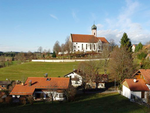 Seeg - Pfarrkirche mit Friedhof